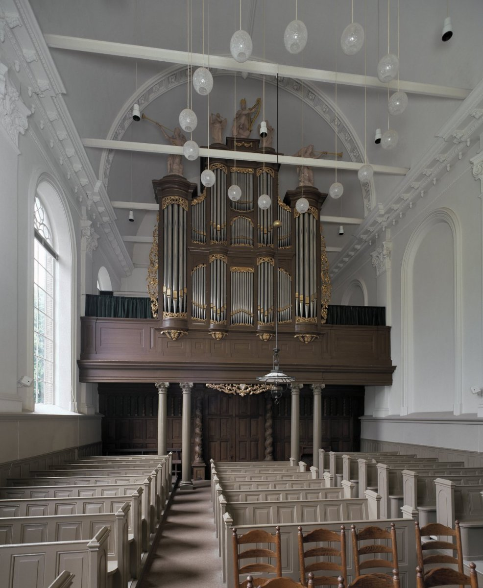 Nederlands Hervormde Kerk: Interieur, aanzicht orgel, orgelnummer 958 (opmerking: Gefotografeerd voor Het Historische Orgel in Nederland 1858-1865)